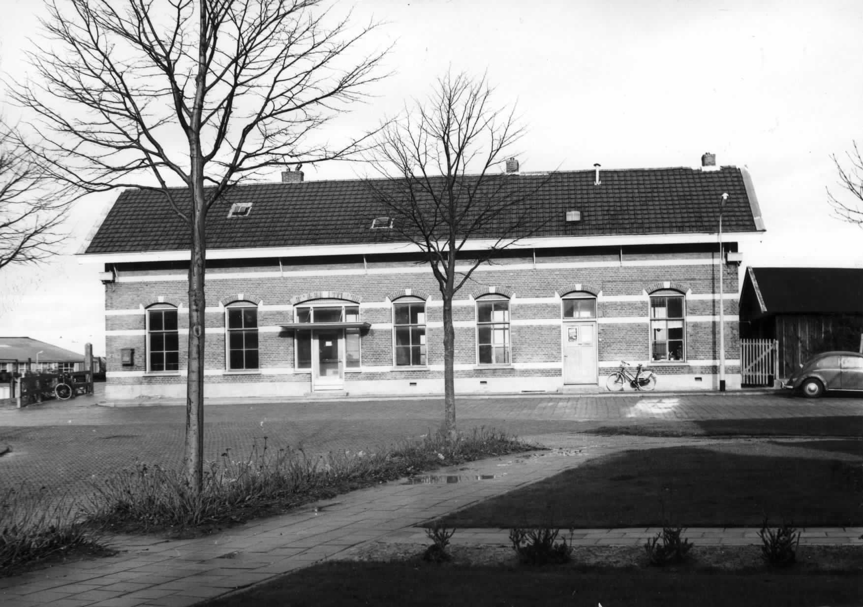 Gezicht op het N.S.-station Uithuizen te Uithuizen.